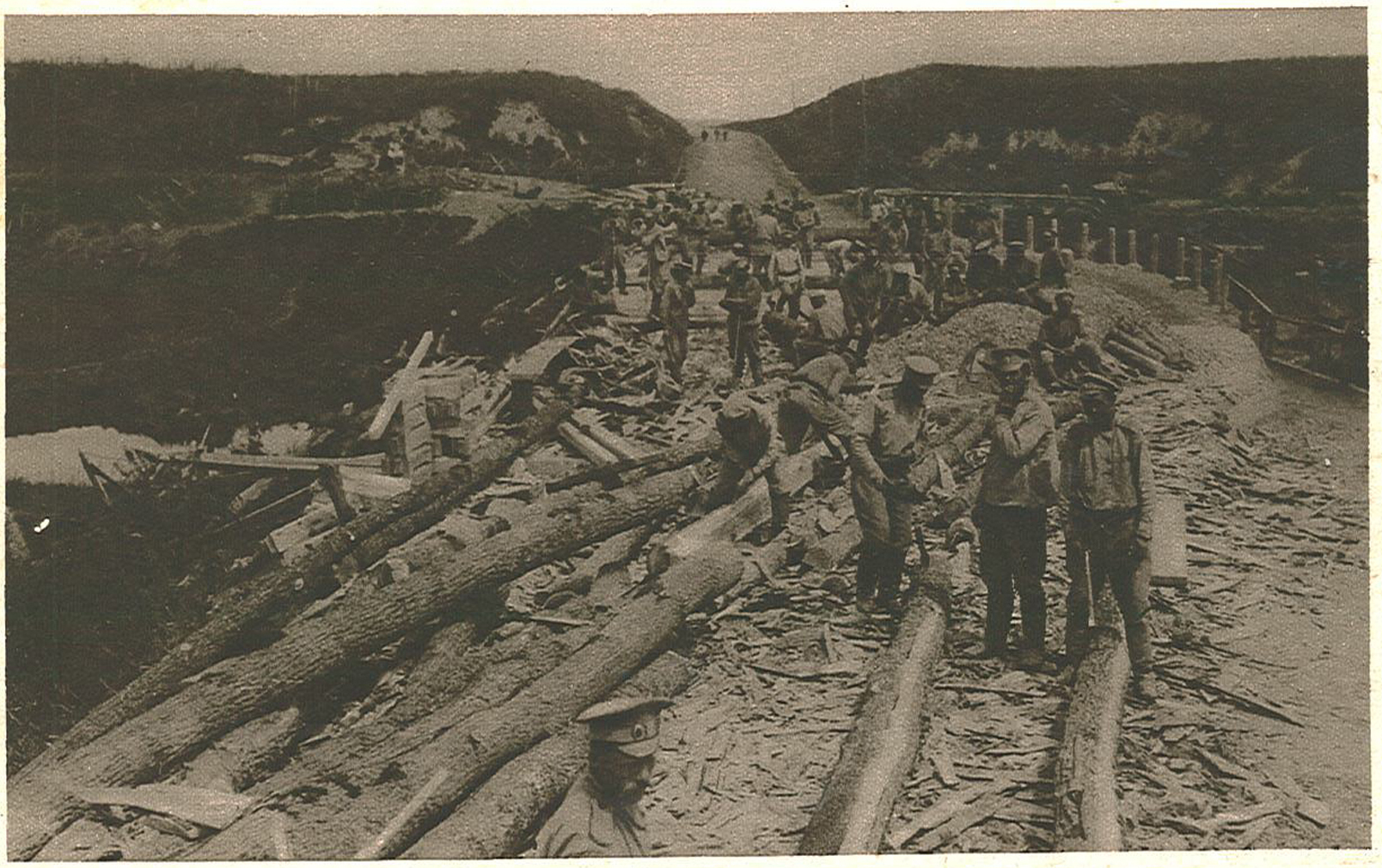 Le Miroir, n°141. 6 août 1916.